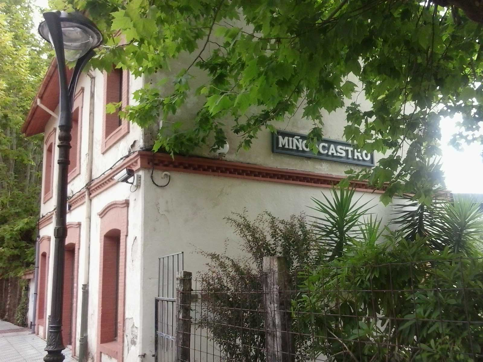 Estación de Miño Castro, A Coruña Galiza